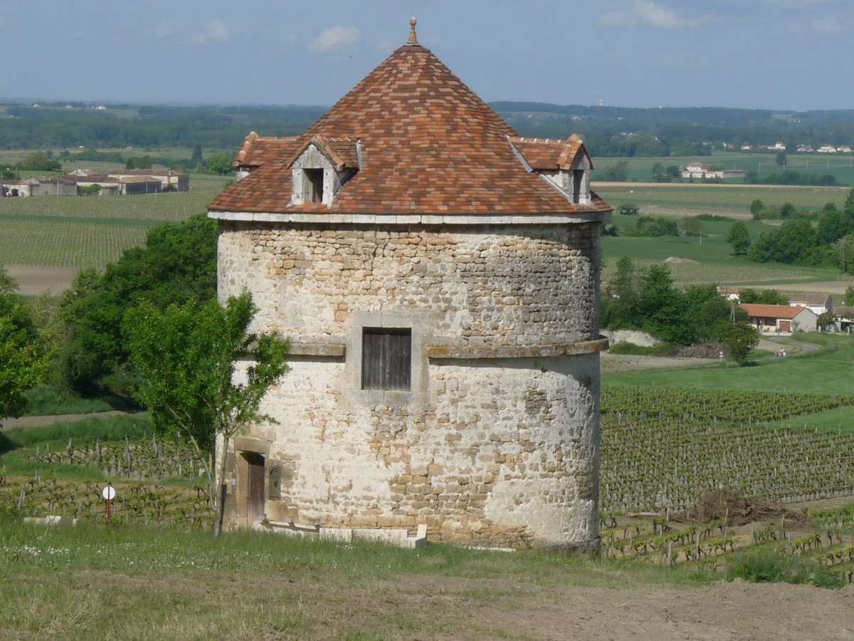 Pigeonnier du château d'Ardenne, Charente, France